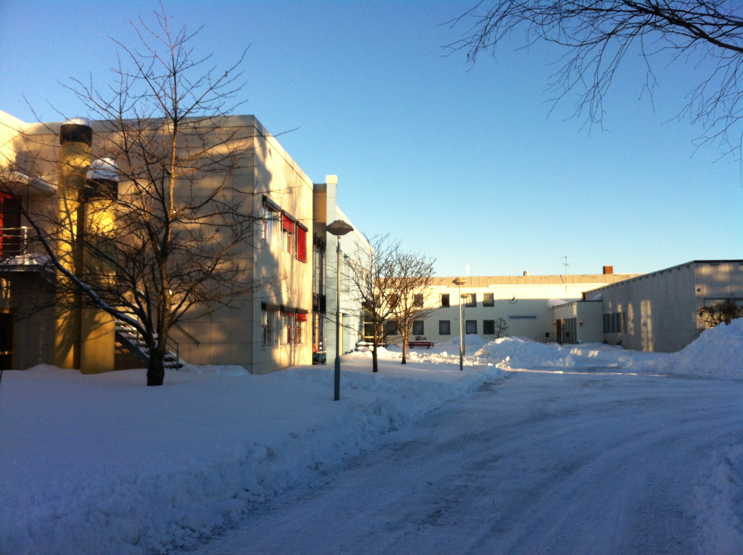 Hovedinngangen ved Risør Vgs.